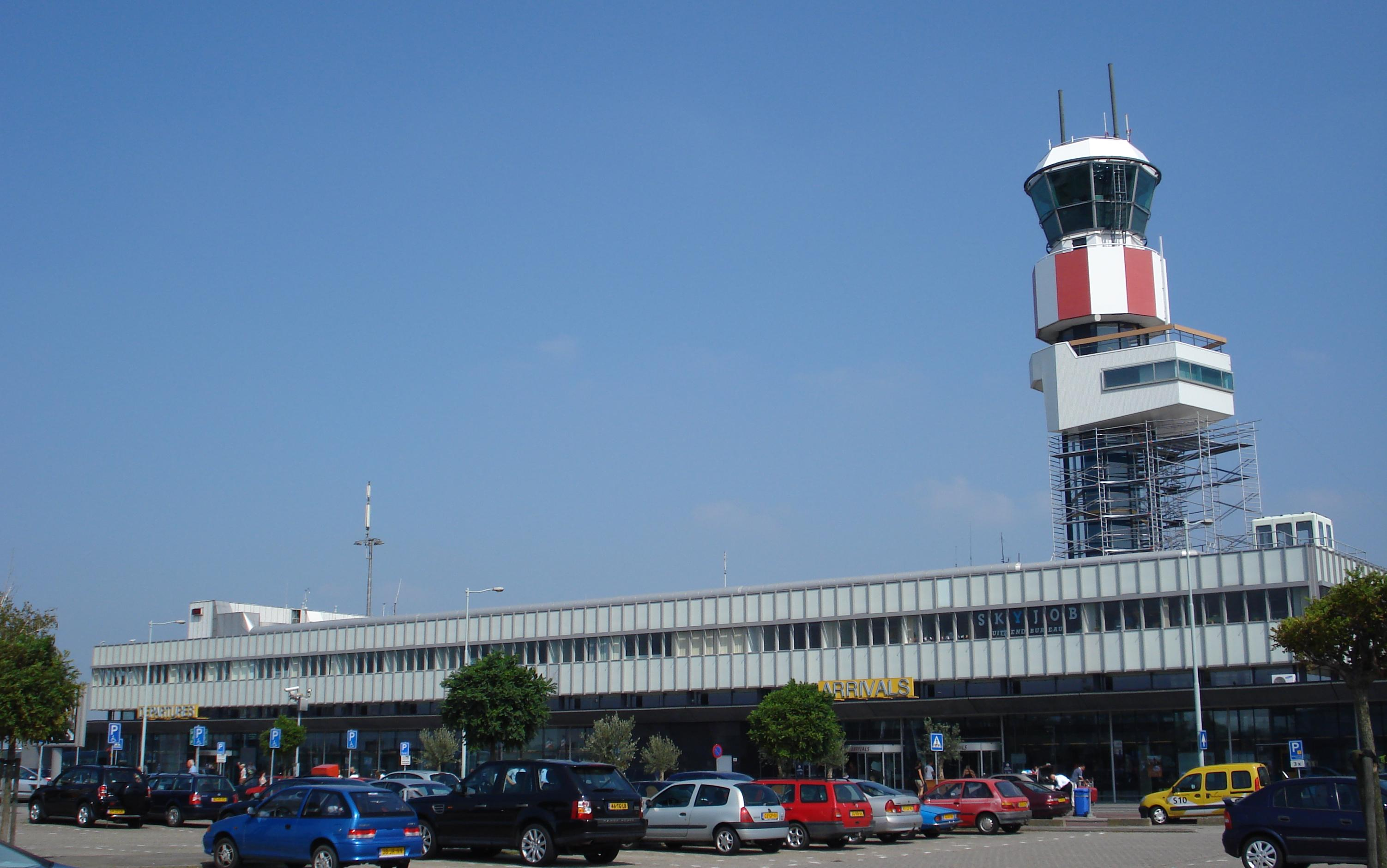 Rotterdam Airport, entrance.